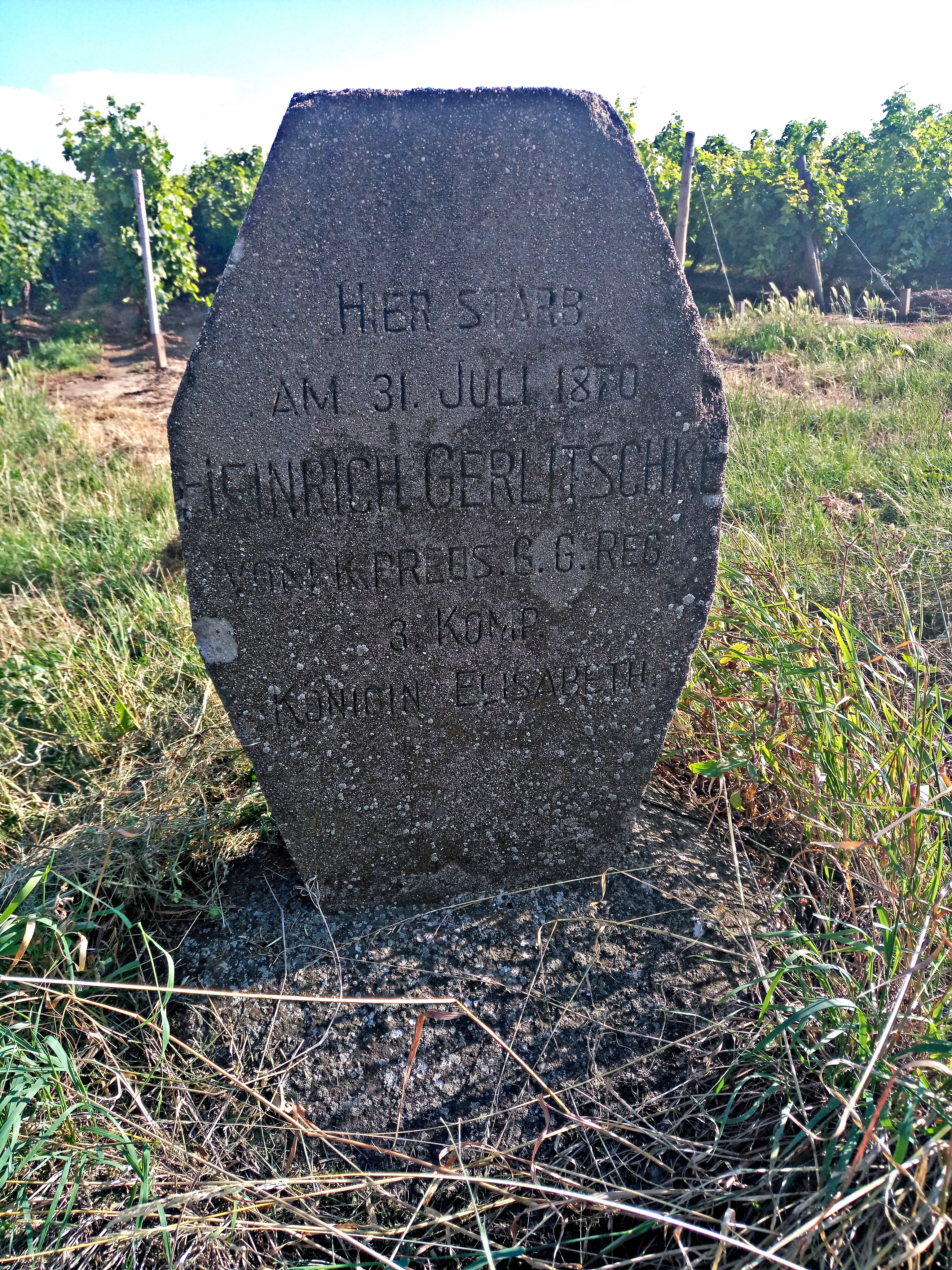 Dirmstein, Gedenkstein Heinrich Gerlitschke, 1870